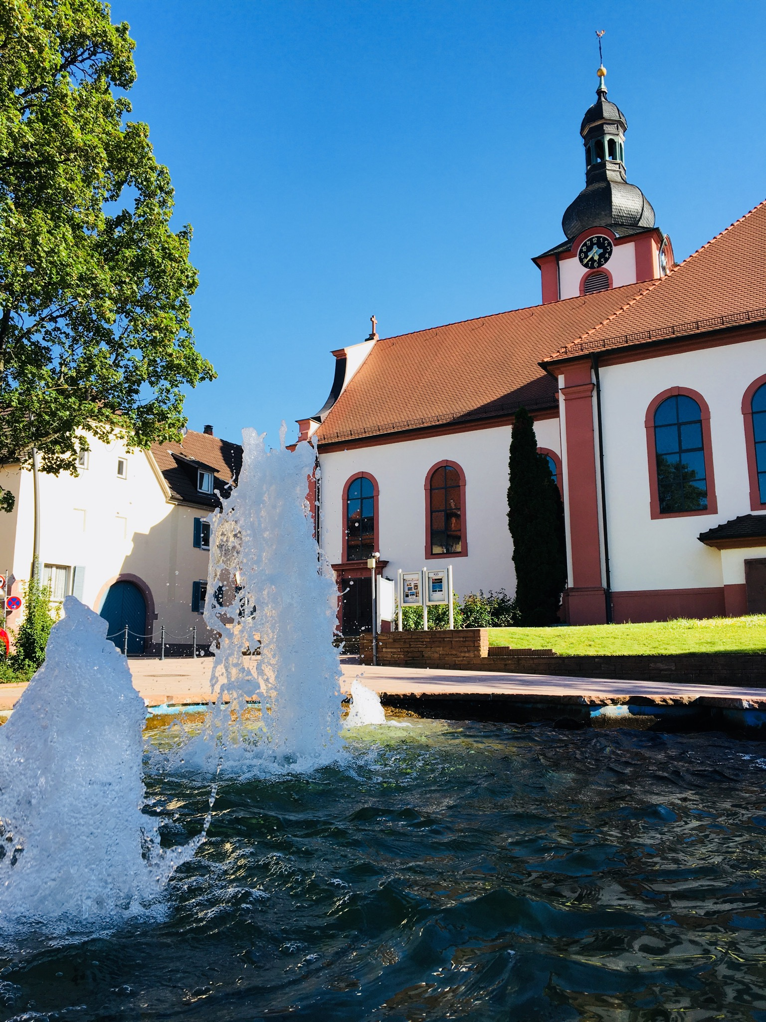 Pfarrkirche-Sankt-Laurentius-Nussloch-Kirchplatz-mit-Brunnen